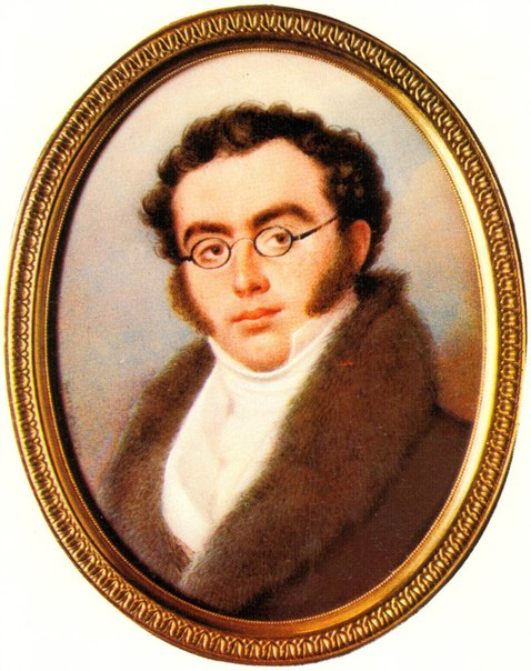 Граф Василий Петрович Завадовский (1798–1855)